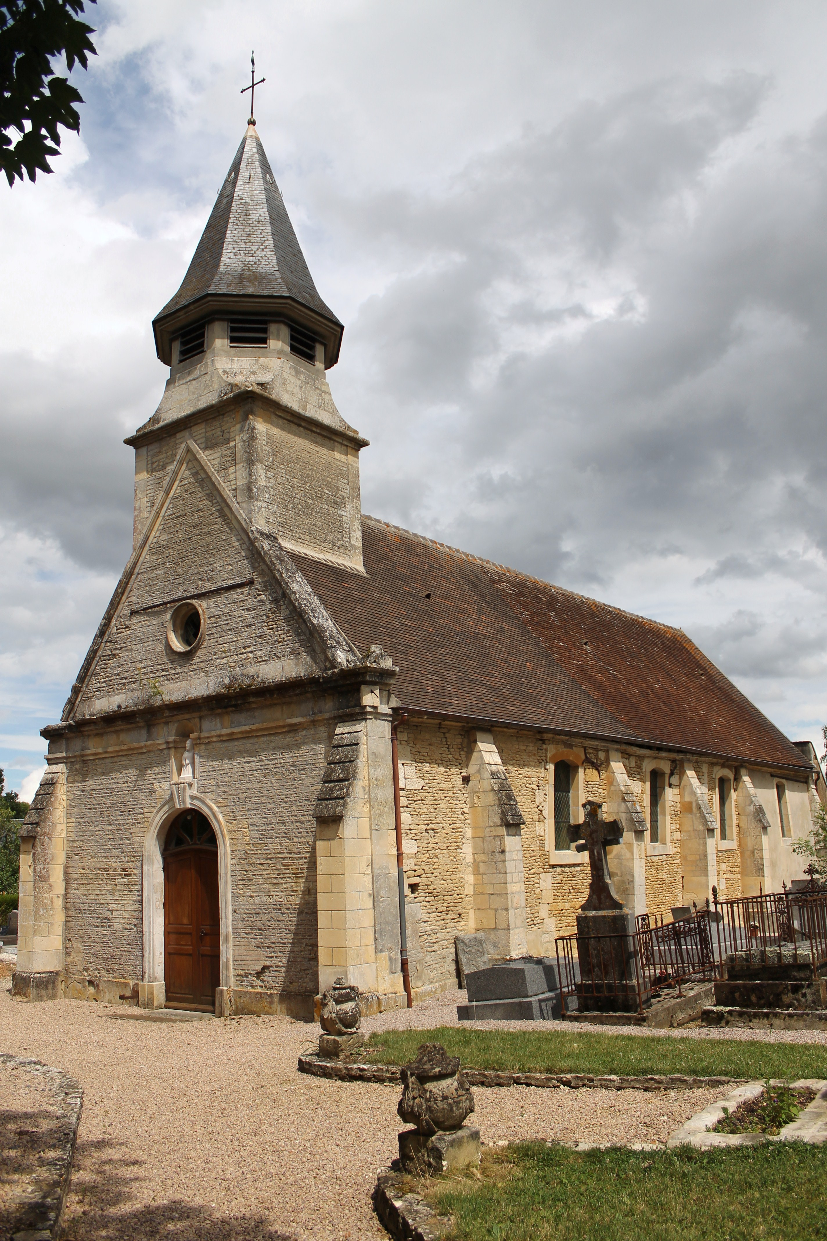 Église Sainte-Croix de Bissières (Calvados)